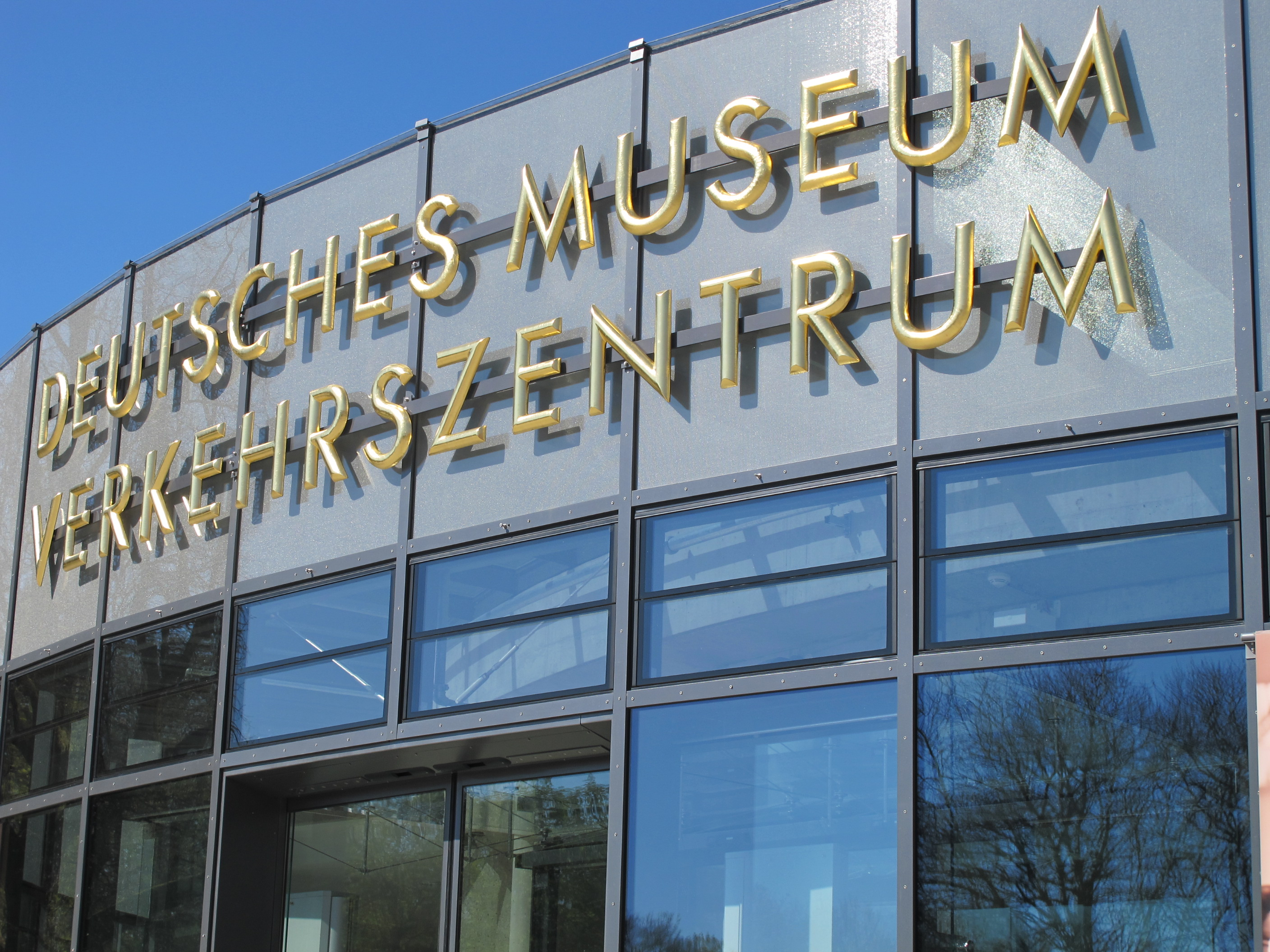 Eingang zum Verkehrszentrum des Deutschen Museums